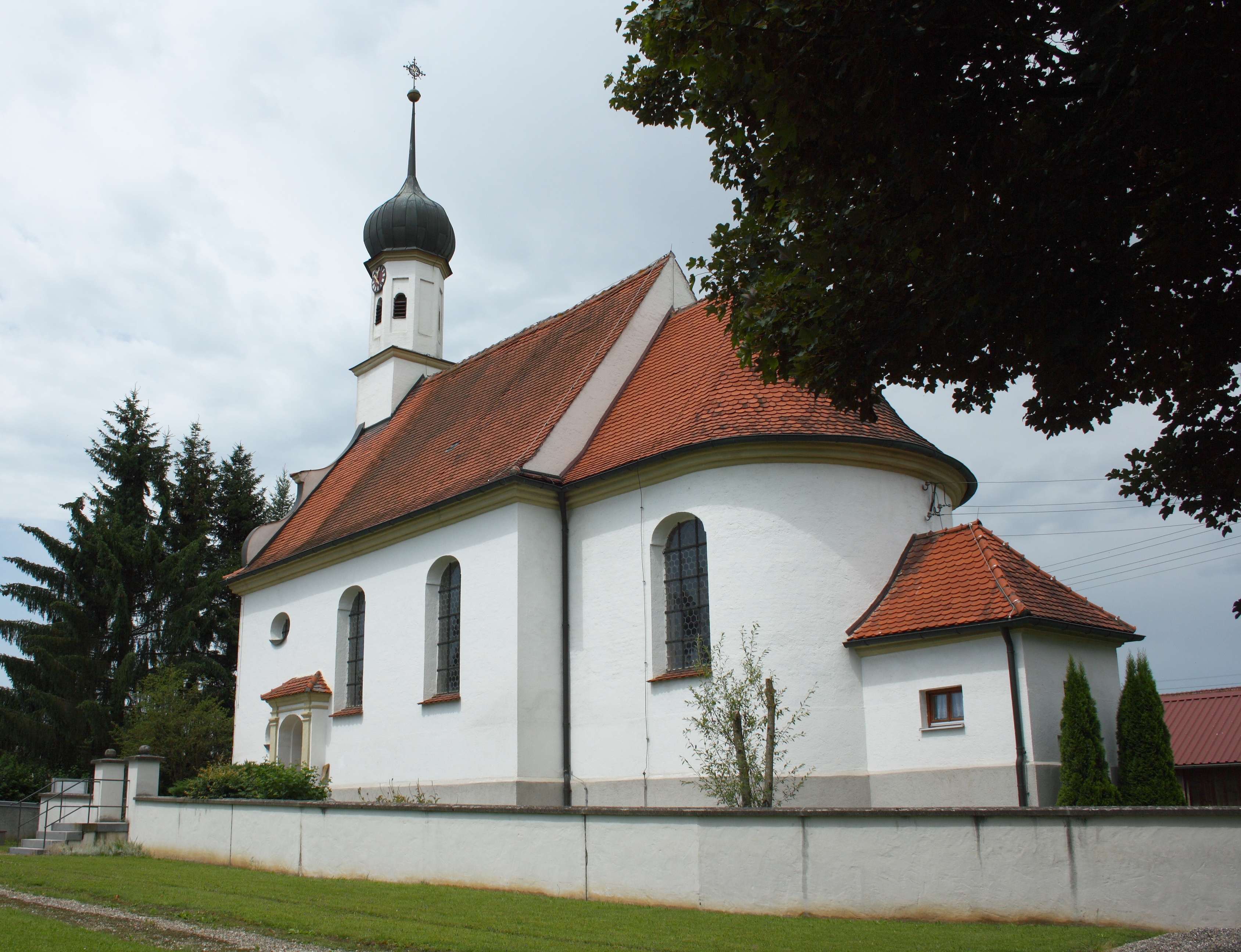 Katholische Kirche St. Oswald in Glöttweng, einem Ortsteil von Landensberg im Landkreis Günzburg (Bayern)